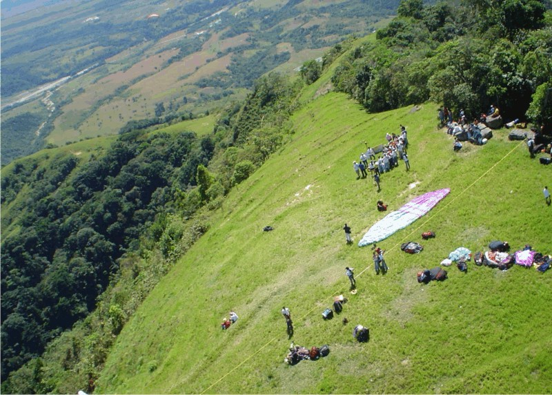 parapentismo